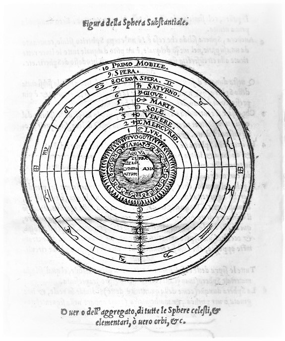 «Figura della sphera substantiale», iIllustrazione da Joannes de SacroBosco (1230), Sphera volgare novamente tradotta, sottotitolo: con molte notande additioni di geometria, cosmographia, arte navicatoria, et stereometria, proportioni, et qvantita delli elementi, distanze, grandeze, et movimenti di tvtti li corpi celesti, cose certamente rade et maravigliose, stampato a Venezia, per Bartholomeo Zanetti, «anno salutis nostre M. D. XXXVII. mense Ottobri, &c. [Oct. 1537]»